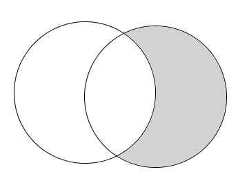 Lúnula